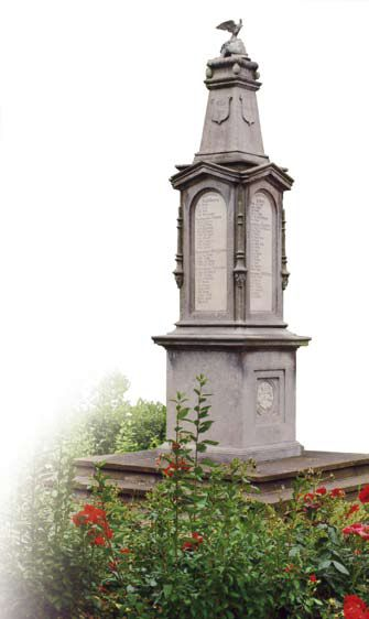 Kriegerdenkmal in Bergheim